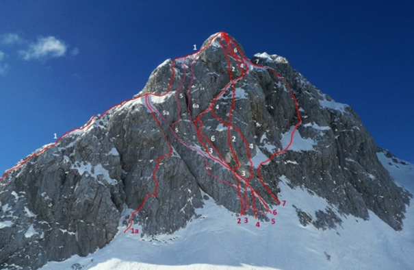 Severna stena Pelca nad Klonicami